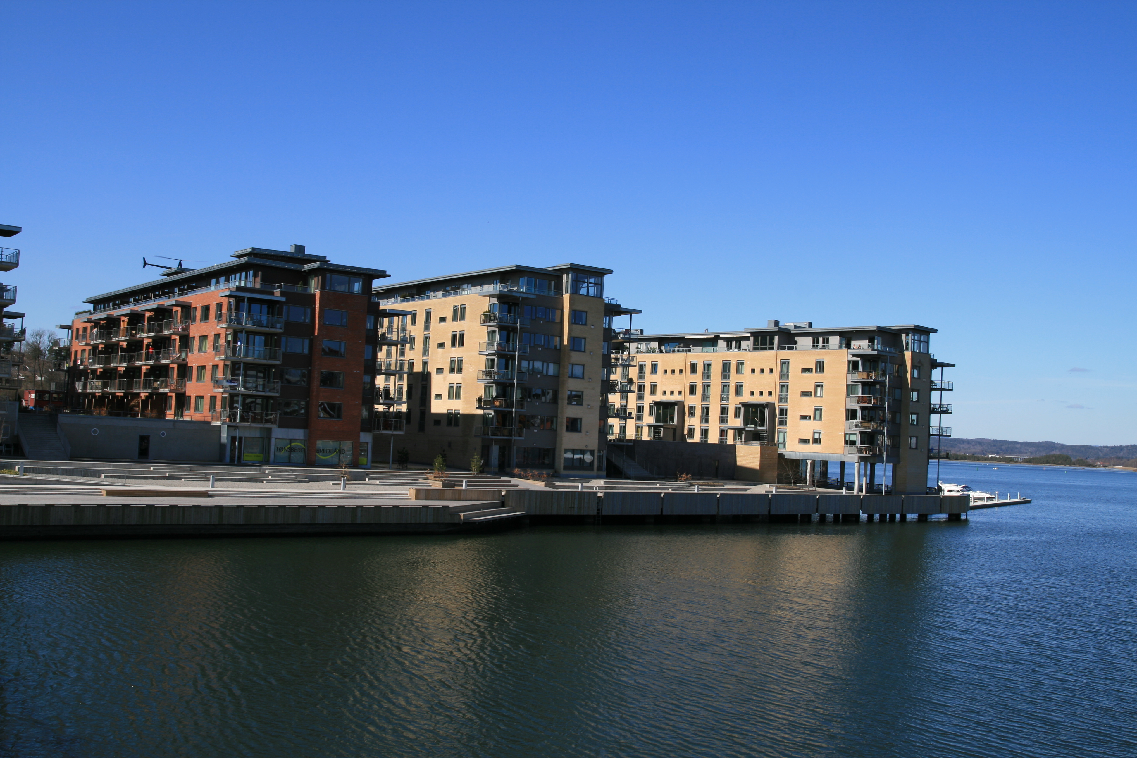 Nå tutær'em ikke lenger på Kaldnes. Gamle og ærverdige Kaldnes Mekaniske verksted har blitt erstattet av hypermoderne, Aker brygge-inspirerte leiligheter med helikopter på taket og utsikt mot byen på andre siden av kanalen. --- Modern apartment blocks at the site of the old Kaldnes ship wharf in Tønsberg.